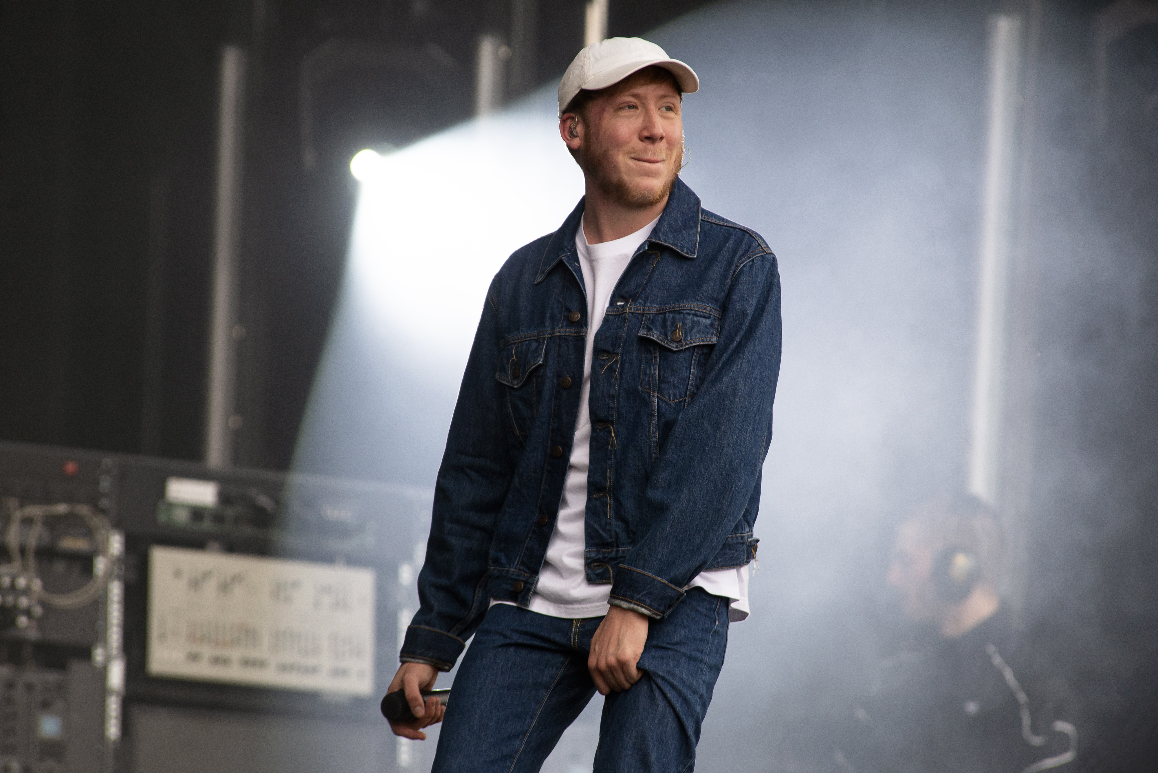 Concert d'Eddy de Pretto au festival Papillons de nuit 2019 à Saint-Laurent de Cuves, Manche, Normandie.